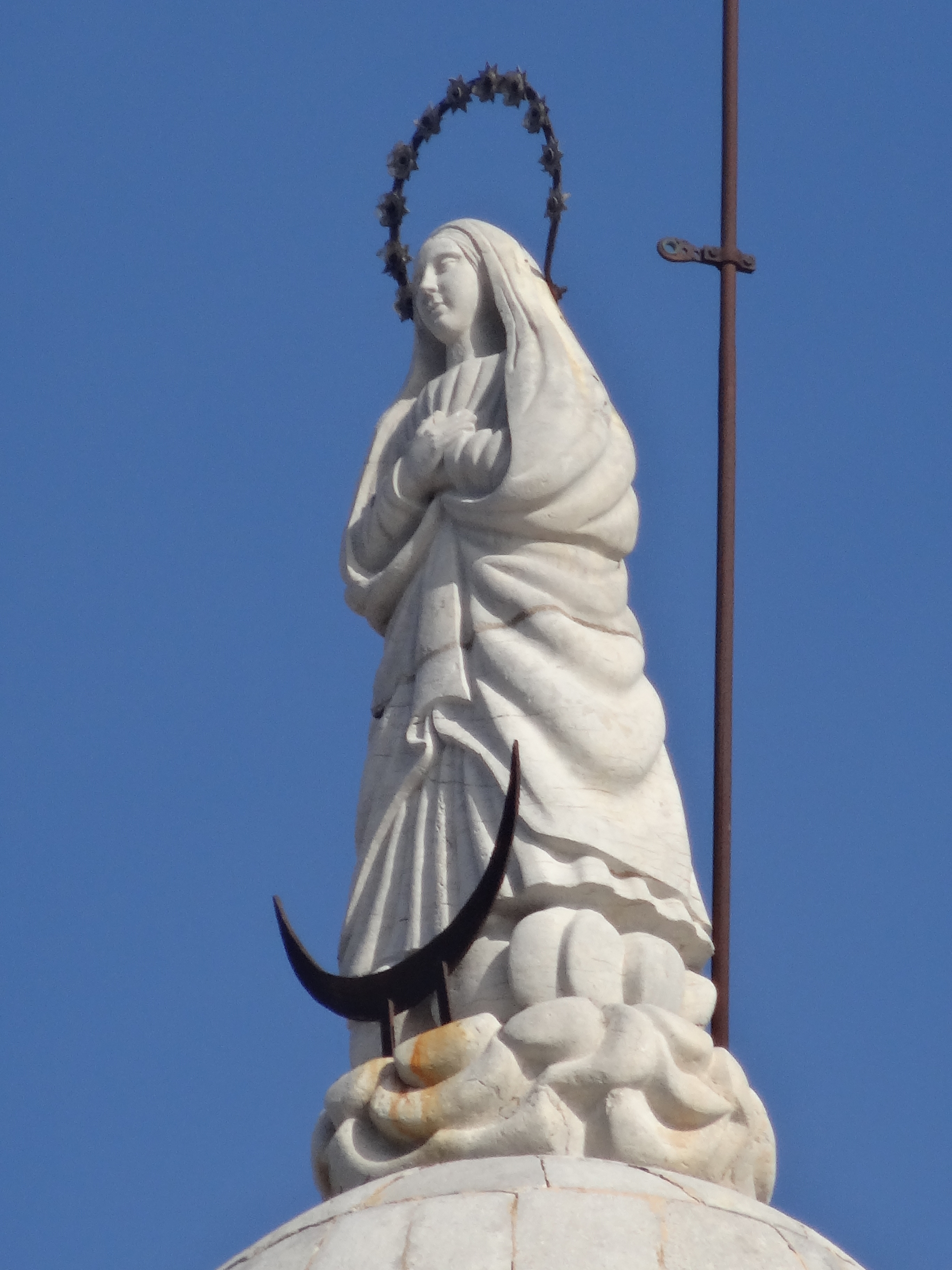 Sant Bartomeu i Santa Tecla de Sitges. Escultura al cim del campanar octogonal